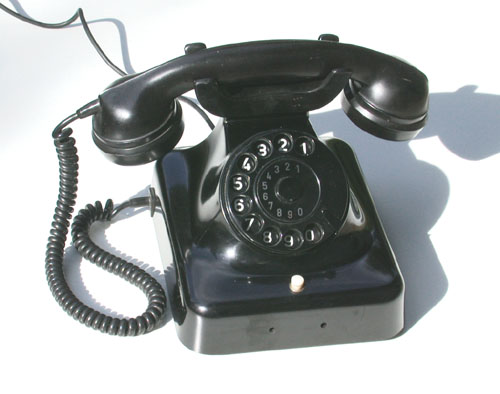 Post Telefon W48mT